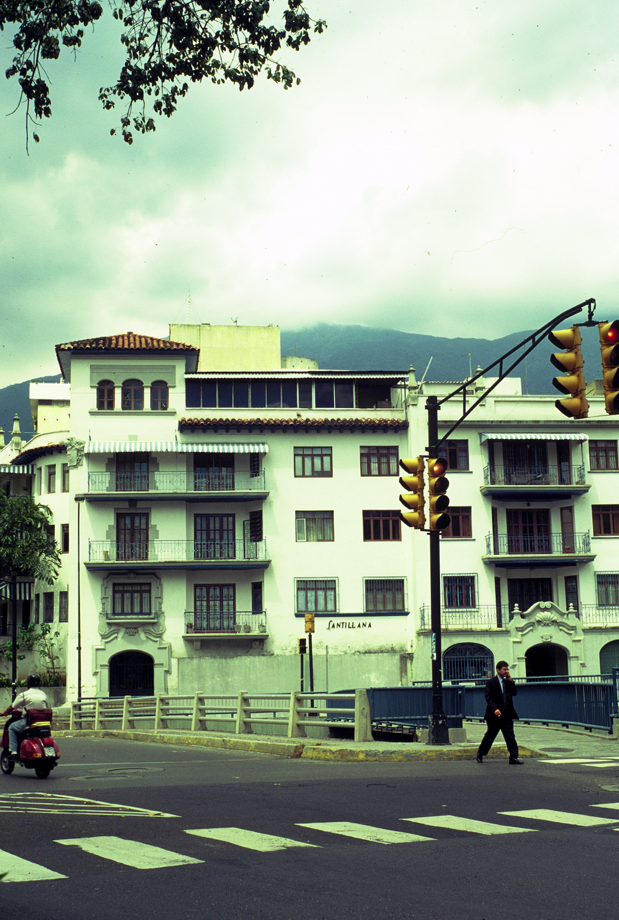 Edificio Santillana en Caracas (Venezuela), cuyo nombre y estilo arquitectónico dan fe de la inmigración del Norte de España a mediados del siglo XX